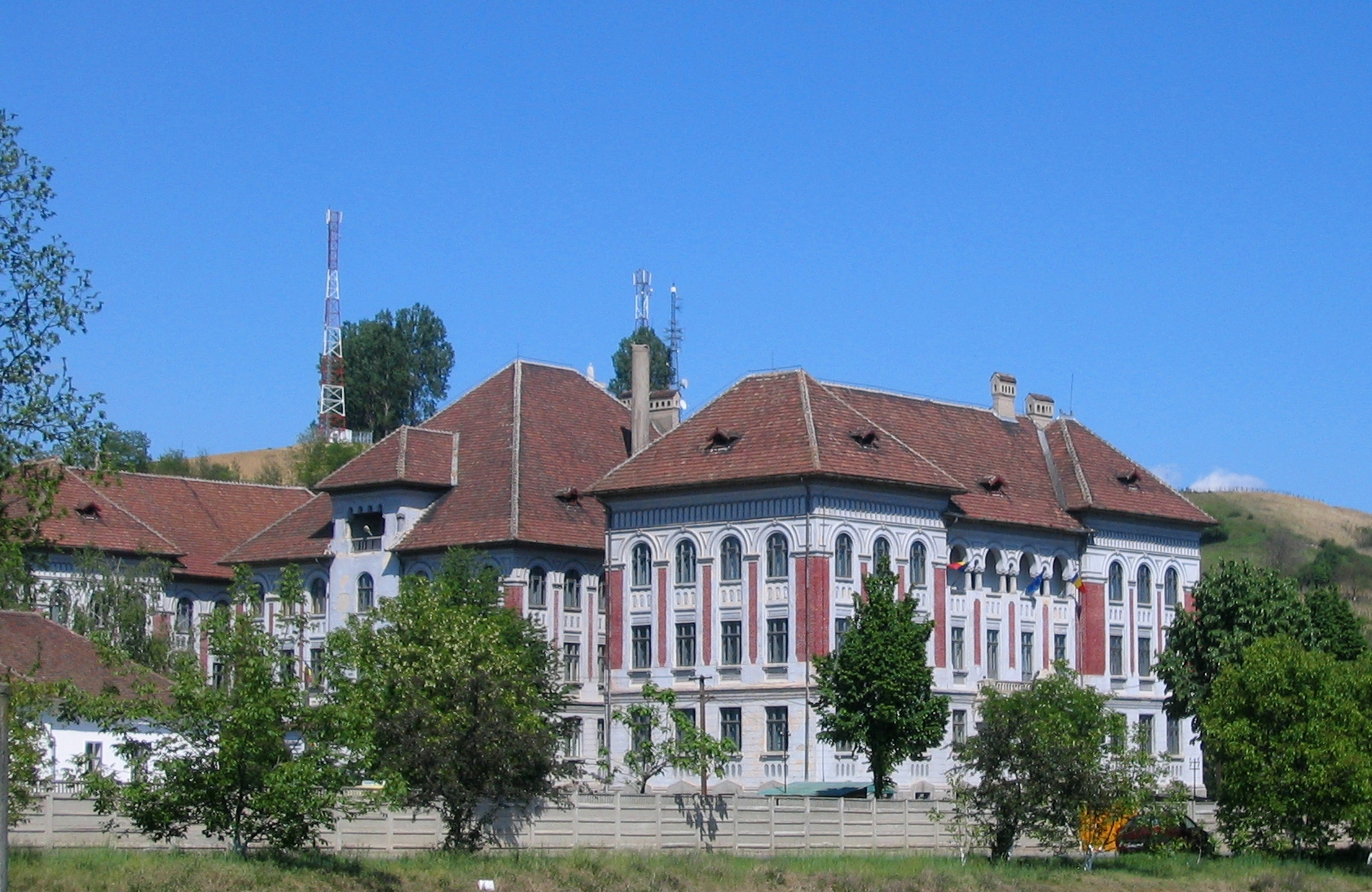 Institutul Recunostintei, astazi Colegiul national Inocentiu Micu Clain, Blaj